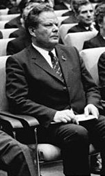 ADN-ZB Reiche 23.10.87 Berlin: Jubiläum-Staatsakt. Mit einem Staatsakt der Deutschen Demokratischen Republik im Palast der Republik fanden die Feierlichkeiten zum 750jährigen Jubiläum Berlins ihren Höhepunkt. An der festlichen Sitzung im Großen Saal nahmen u.a. auch der Vorsitzende der SEW, Horst Schmitt, der Vorsitzende der DKP, Herbert Mies, und der Stellvertreter des Vorsitzenden des Staatsrates und des Ministerrates der Republik Kuba, Carlos Rafael Rodriguez (v.l.n.r.), teil.